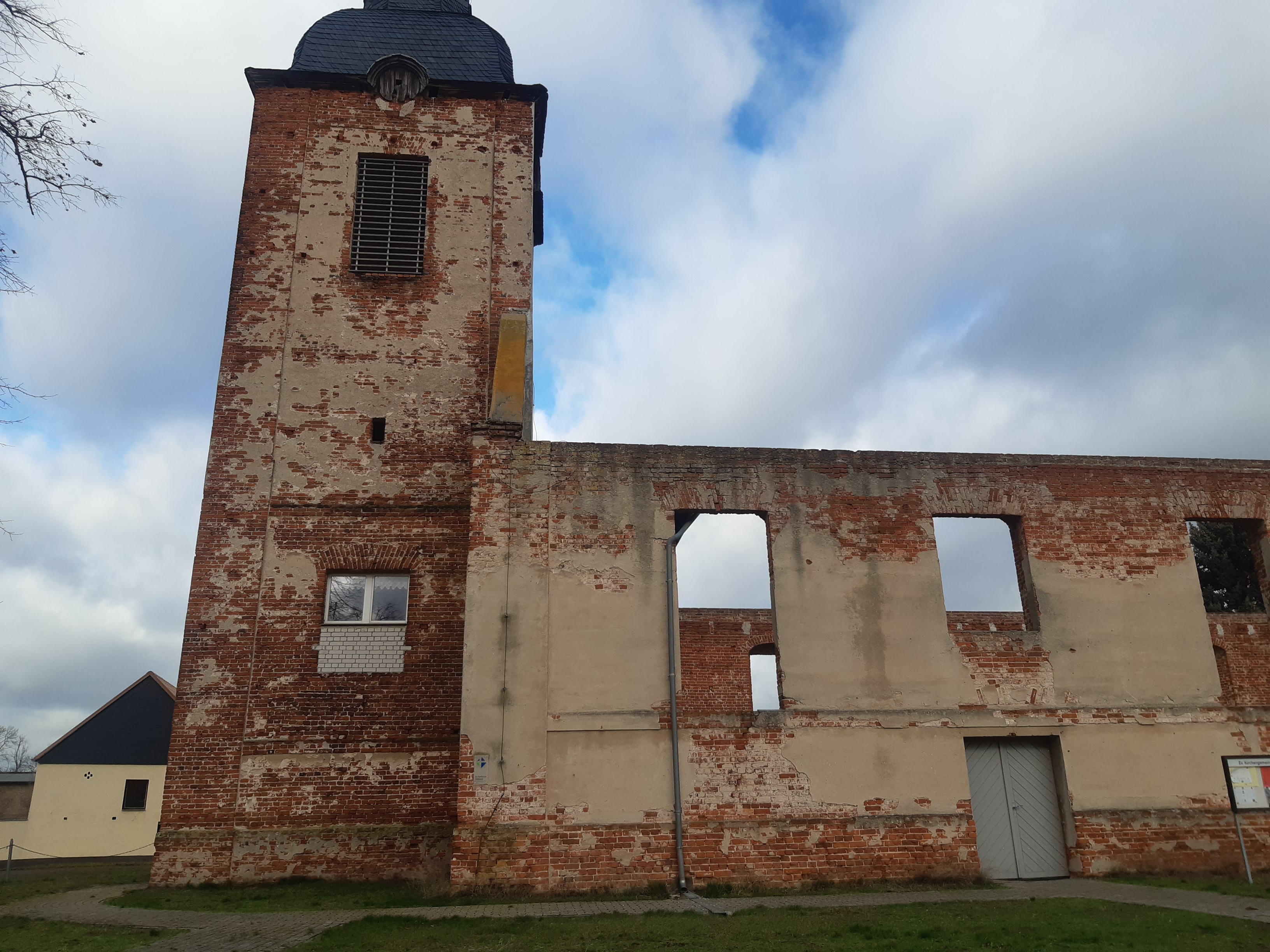 Kirchenruine